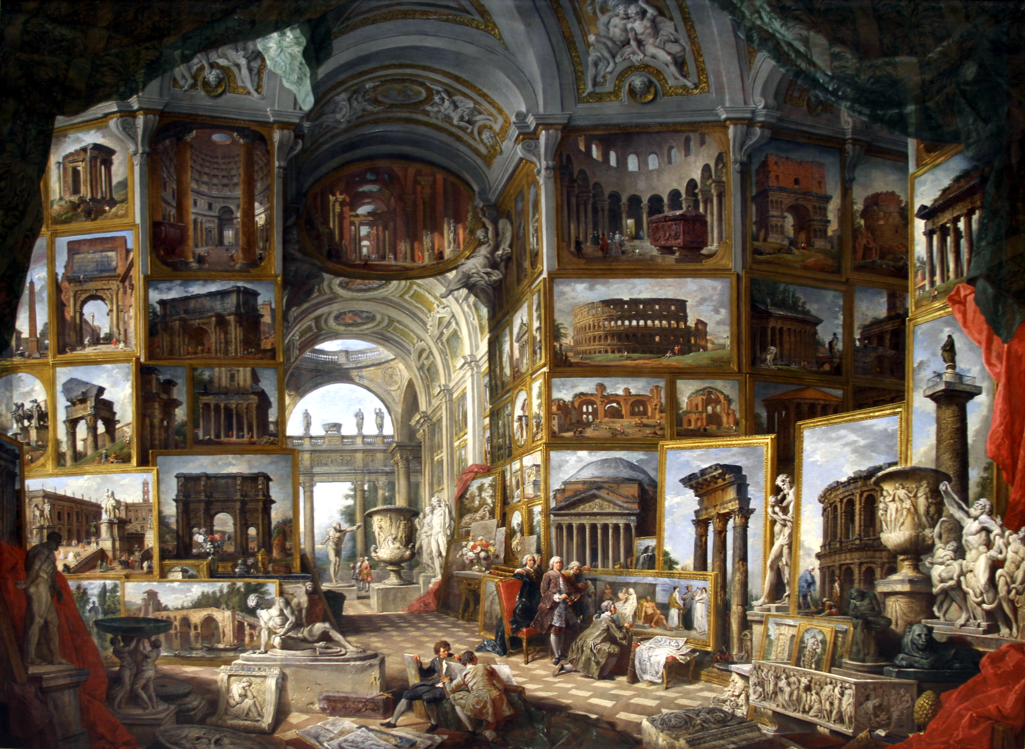 Staatsgalerie - Stuttgart - Germany